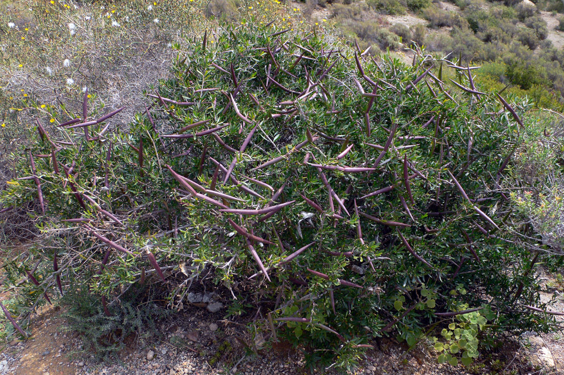 Periploca angustifolia (cornical) en La Azohía, Cartagena (Spain)